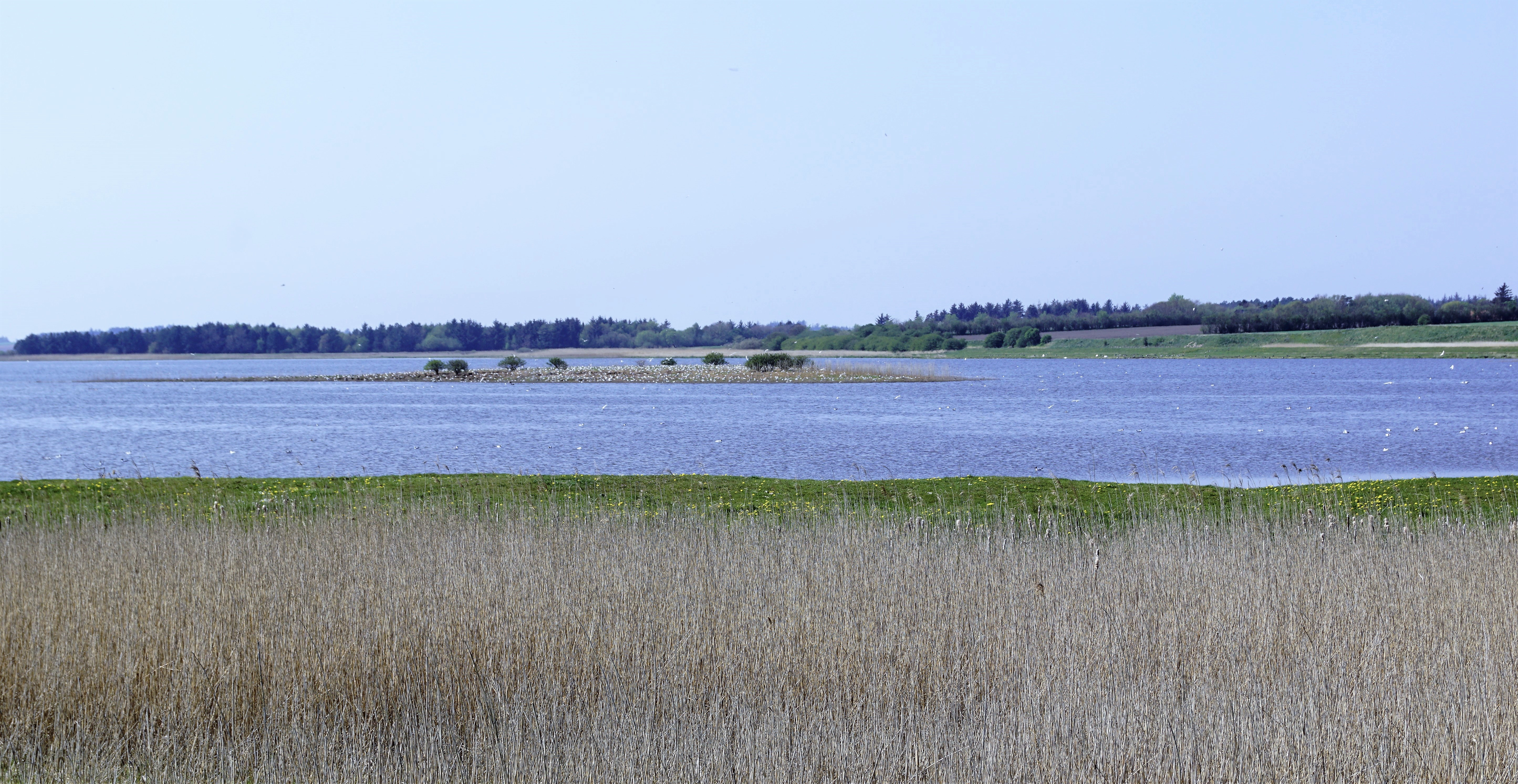 Ørum Sø i Thy, nordøstenden